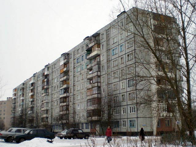 Девятиэтажный дом серии 1-335-АК на улице Ломоносова, 9А в Великом Новгороде